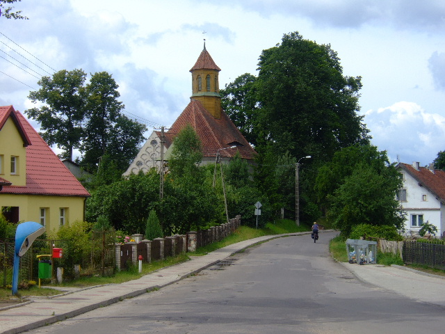 Pozezdrze